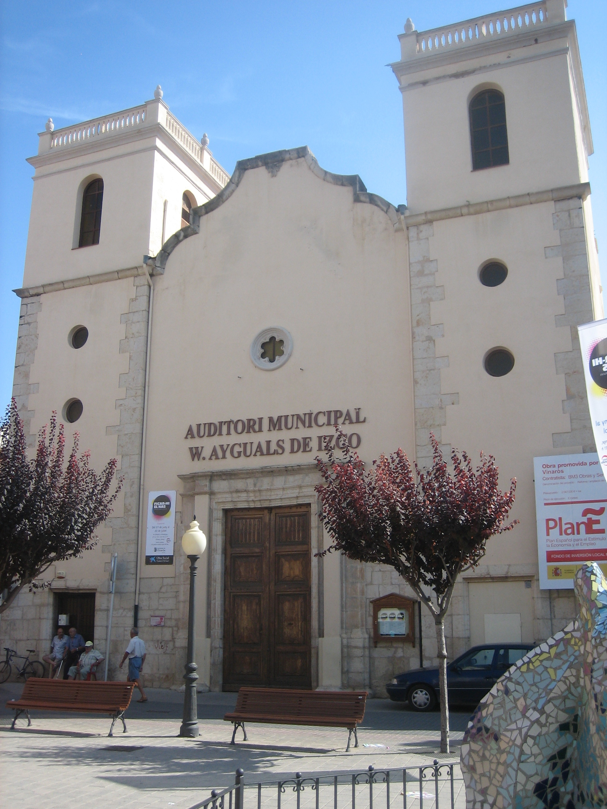 Església de Sant Agustí, actualment Auditori Municipal Wenceslao Ayguals de Izco, Vinaròs (Baix Maestrat)